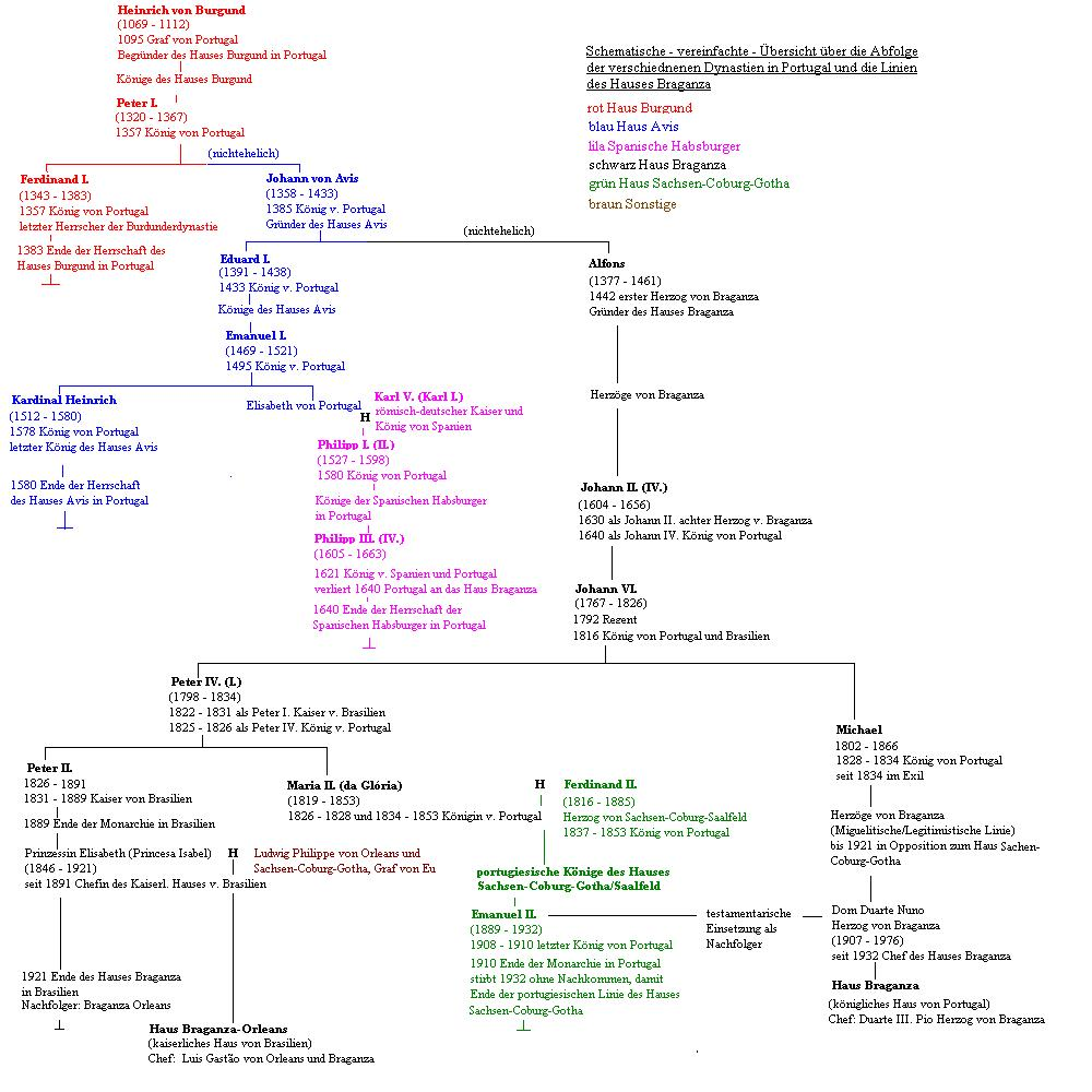 Übersicht portugiesische Dynastien